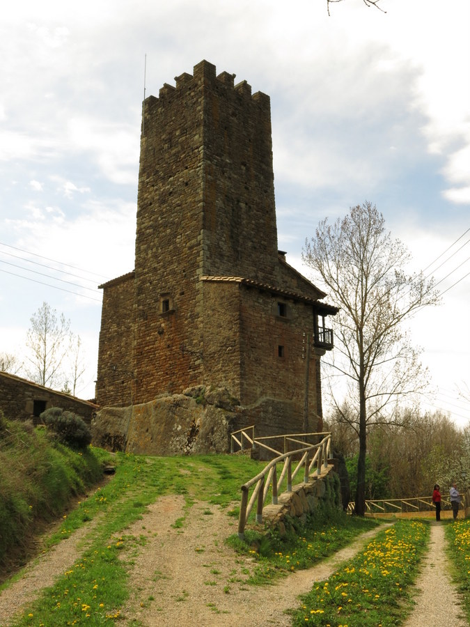 Torre de la Vall - Osona / Catalunya